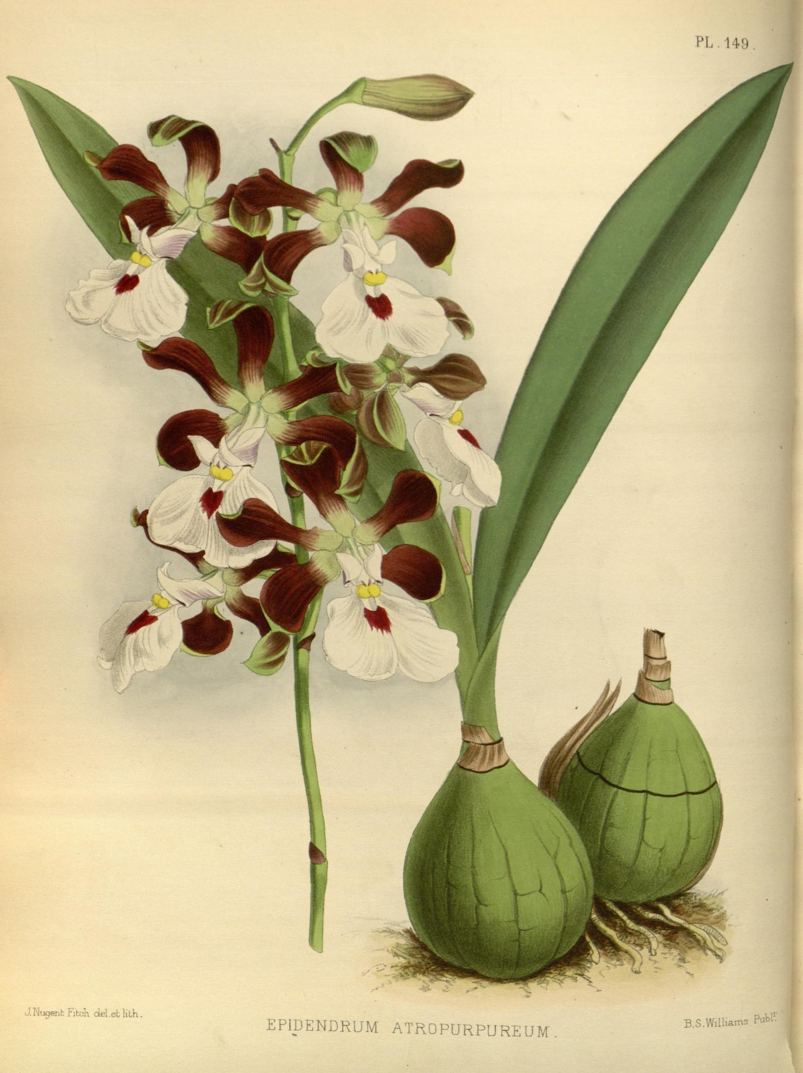 PL. 149. V V \^?K ^K »-^» i*^' Jllu^ienb FibcK olel.ellitK. EPIDENDRUM ATROPURPUREUM , B.S.WilHam ^ PtibP